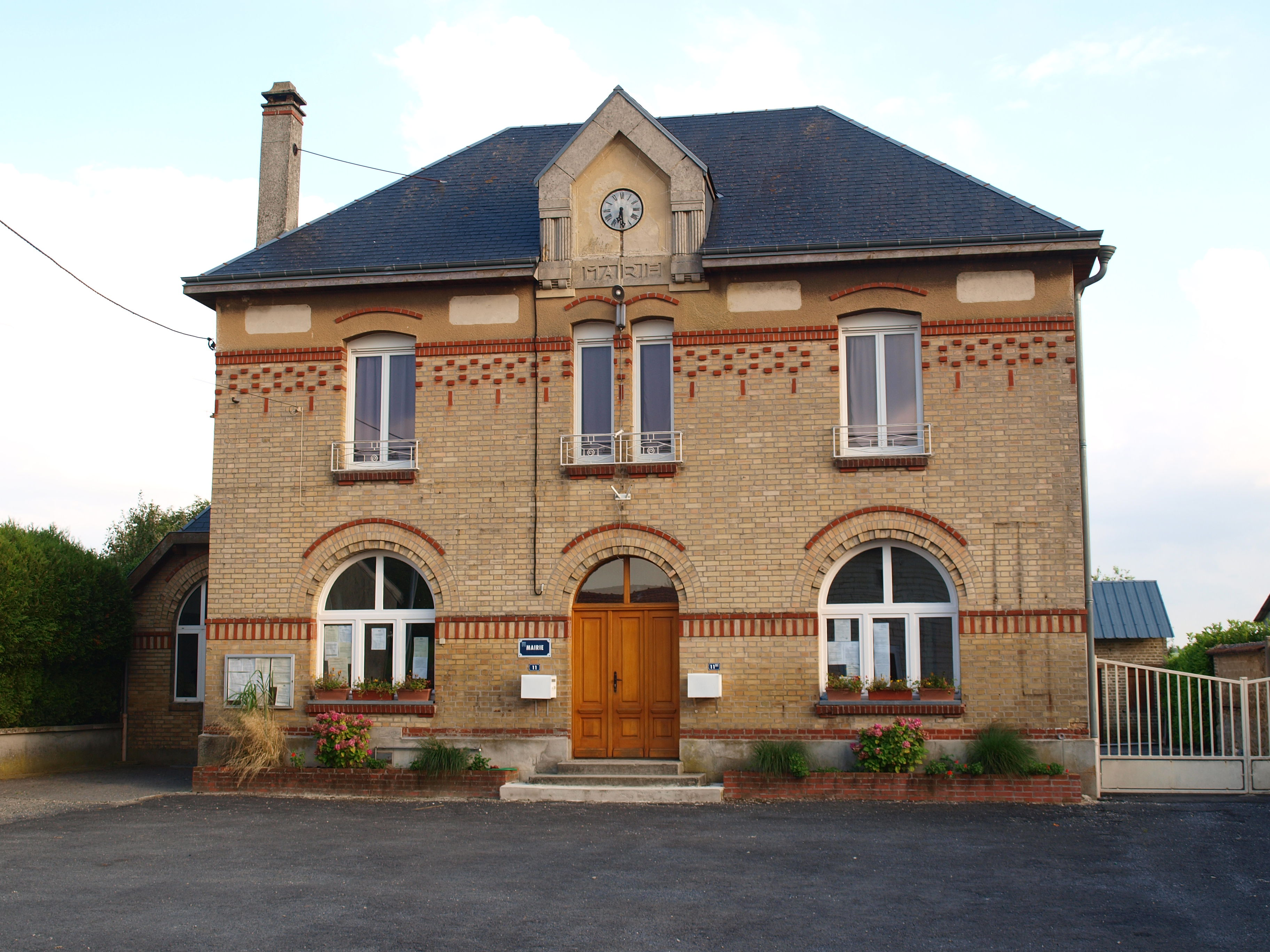 Ménil-Lépinois (Ardennes, France) ; mairie